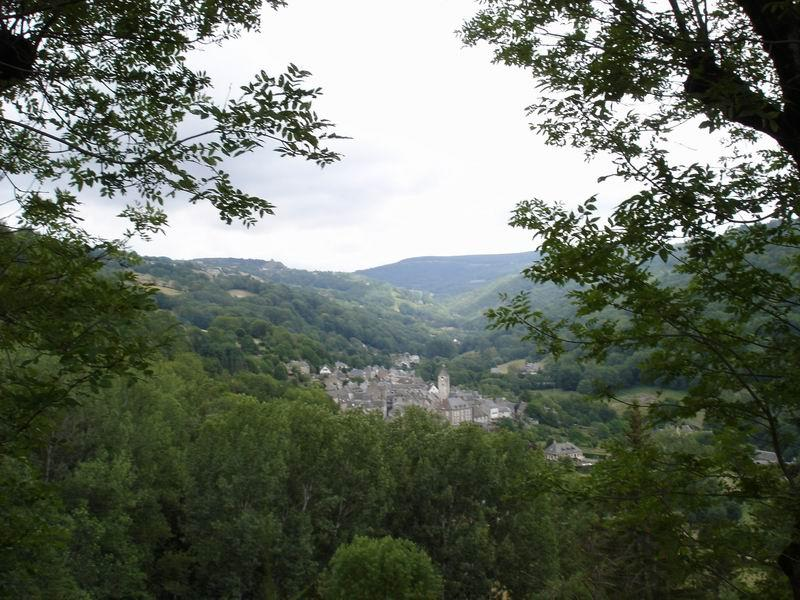 le vallée de Saint Chély d'Aubrac (le plateau est au fond de l'image)